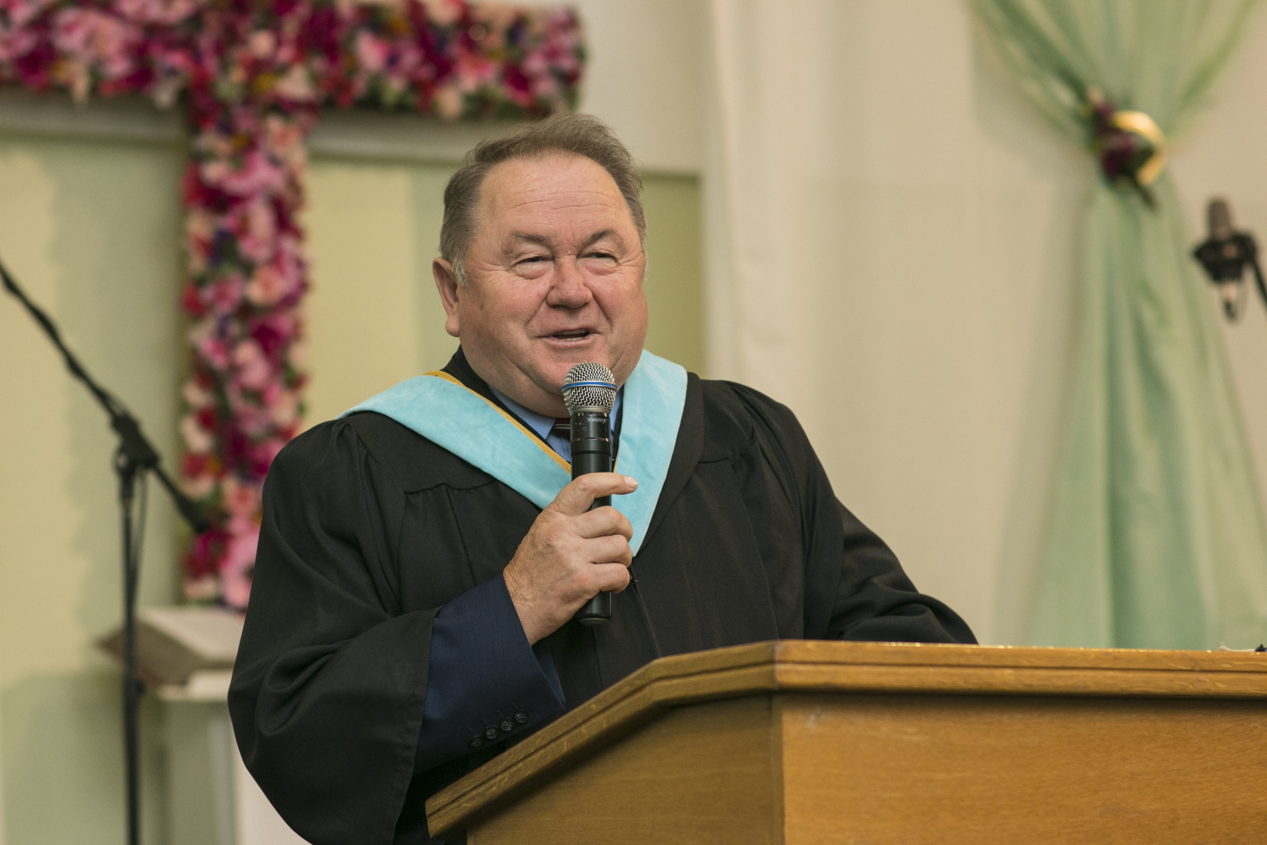 Райчинець Василь Федорович